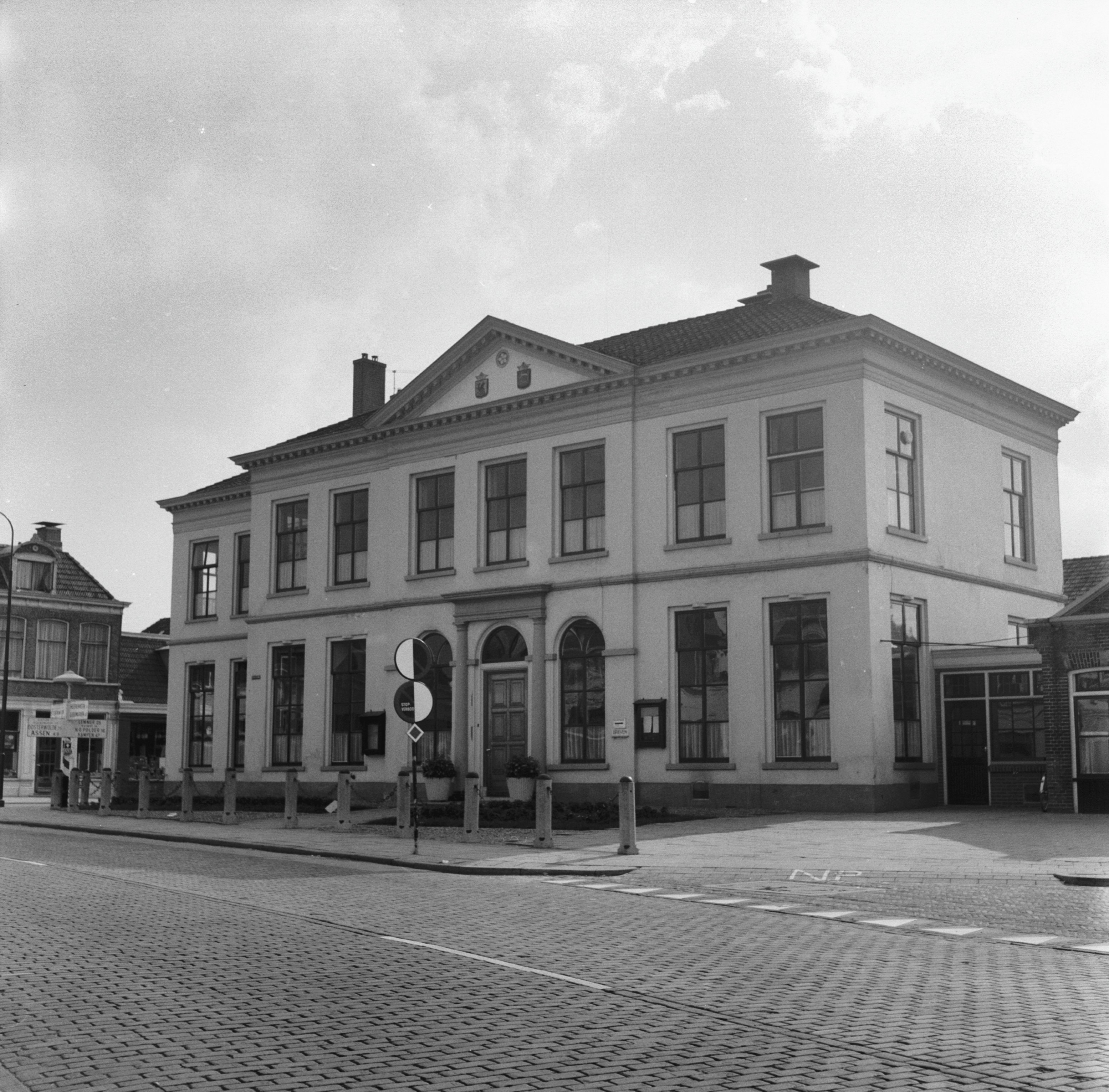 voormalig Raadhuis: in Weststellingwerf